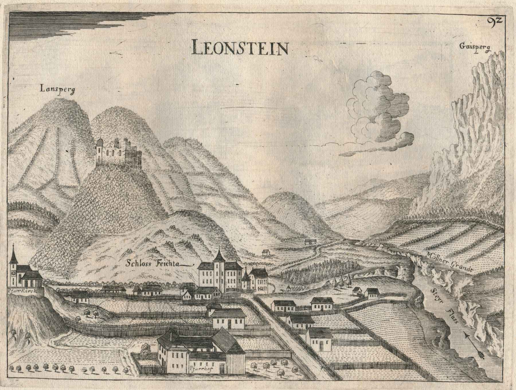 Ansicht von Leonstein (Oberösterreich, heute zu Grünburg) mit Talschloss Feichta (Schloss Leonstein) und der Burgruine Leonstein (heute nur noch wenige Reste). Der Fluss am rechten Rand ist die Steyr. Kupferstich von Georg Matthäus Vischer